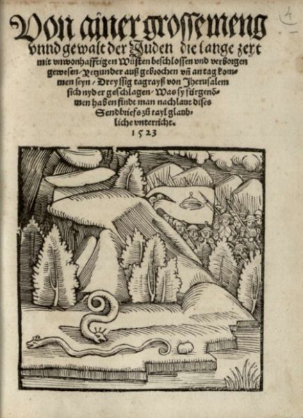 Die schwer bewaffnete Armee der "roten Juden" kommt aus den Bergen der Dunkelheit. Vor ihnen liegt ruhig der mystische Fluss Sambation. Titelblatt einer Flugschrift. Augsburg 1523. VD16 V 2687. Titel: Von ainer grosse meng vnnd gewalt der Juden die lange zeyt mit vnwon-hafftigen Wüsten beschlossen vnd verborgen gewesen/ Yetzunder auß gebrochen vnd an tag kommen seyn.